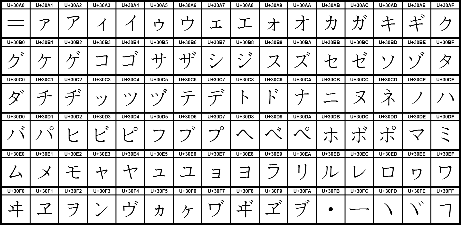 Grafiktafel für den Unicodeblock Katakana.